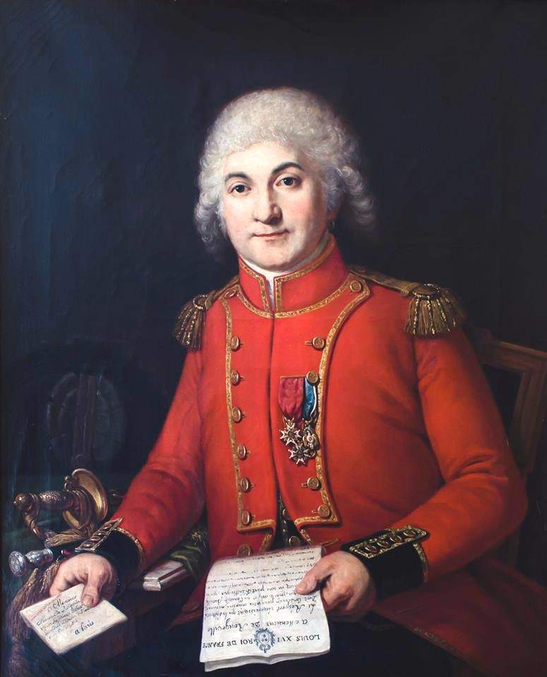 Alexandre Gonsse de Rougeville (1761-1814)